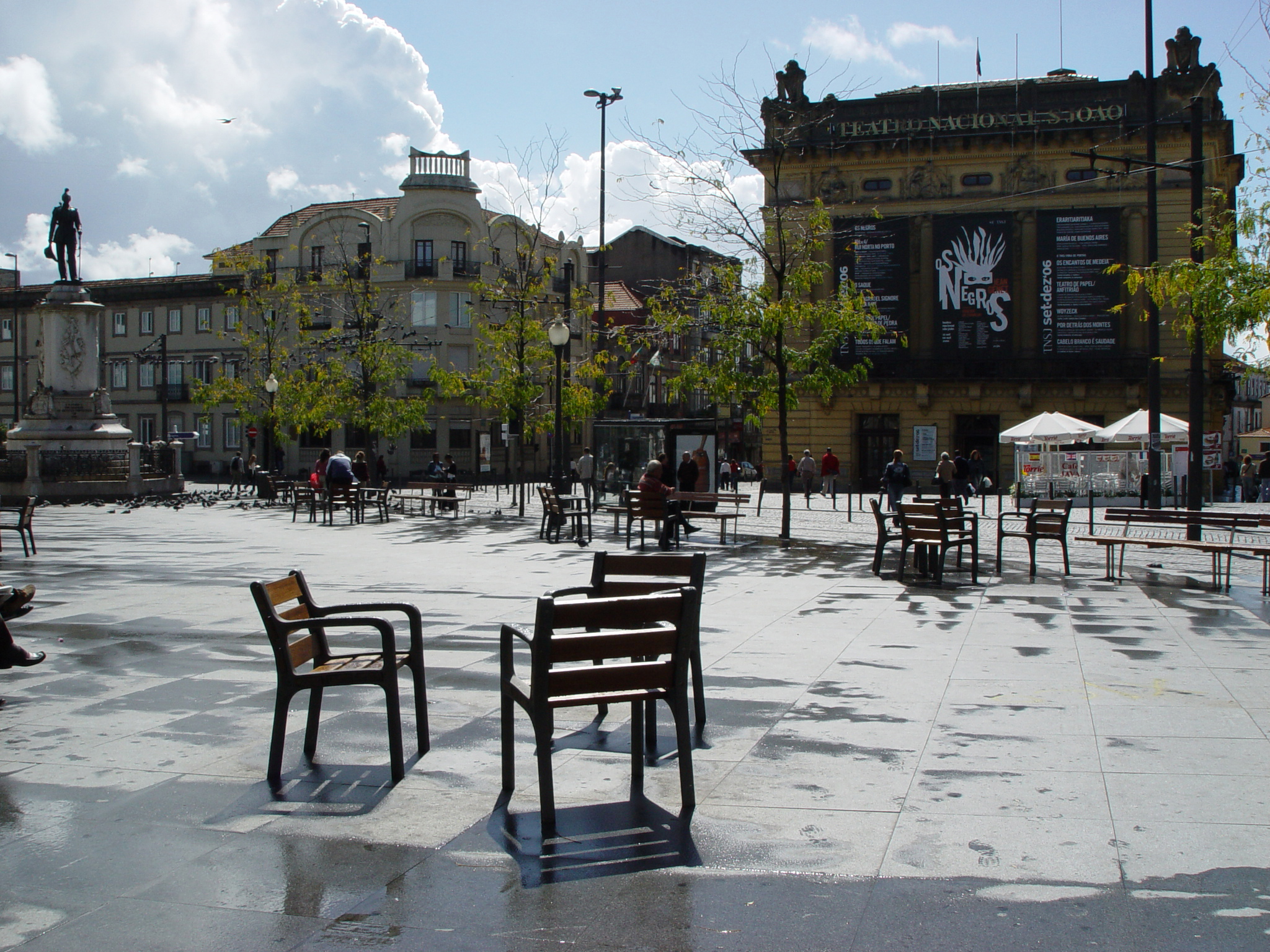 Teatro de São João This file was uploaded for Wiki Loves Monuments in Portugal with the unique identifier 74813.